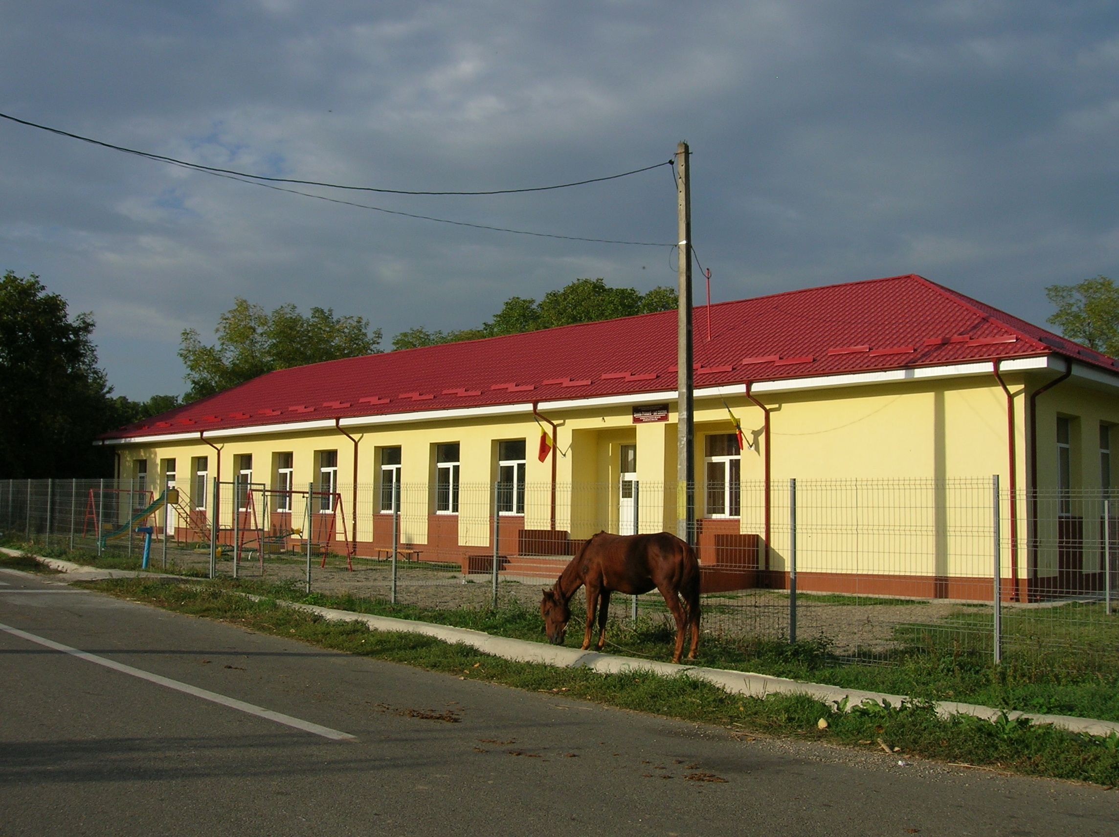 Comuna Valea Seacă Bacău - Satul Cucova - Şcoala cu clasele I-IV Nr. 4